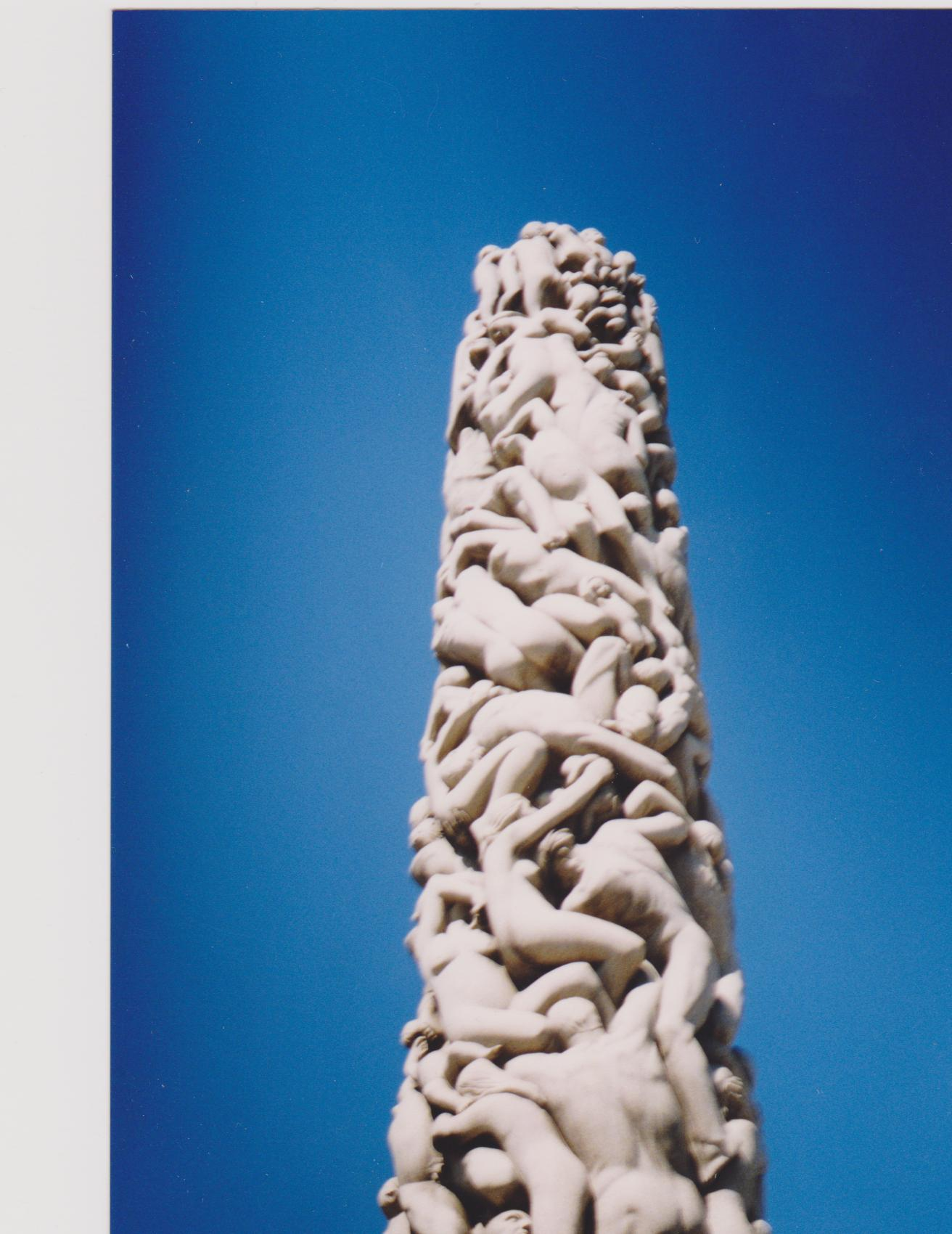 Γκούσταβ Βίγκελαντ: Ο Μονόλιθος. Όσλο, Πάρκο Φρόγκνερ.